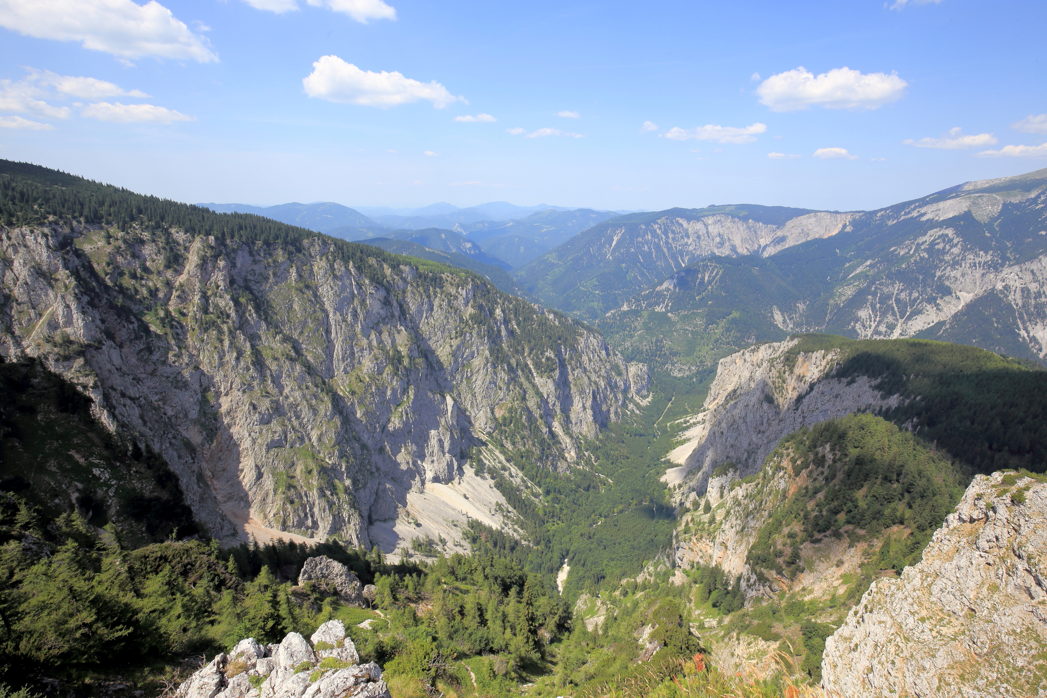 Blick von der Höllentalaussicht in Richtung Talausgang des Großen Höllentals. Im Hintergrund der westliche Teil des Schneebergmassivs.